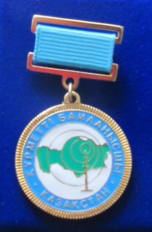 Нагрудный знак "Почётный связист"